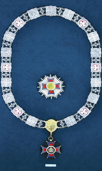 Орден Републике Србије првог степена.